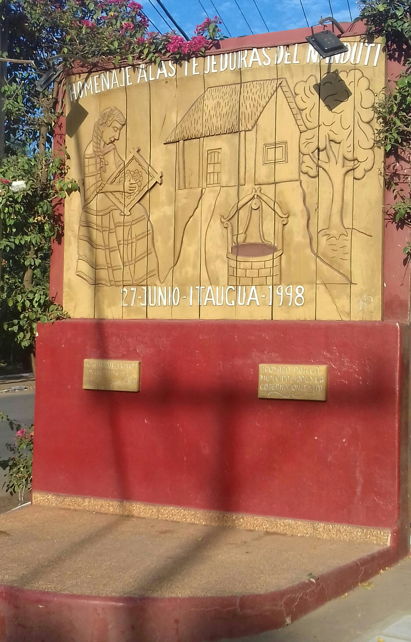 Aspecto que presentaba el retablo de "la Tejedora del Ñandutí" en el barrio San Roque de la ciudad de Itauguá, en julio de 2019. Dicho retablo fue inaugurado en 1998.